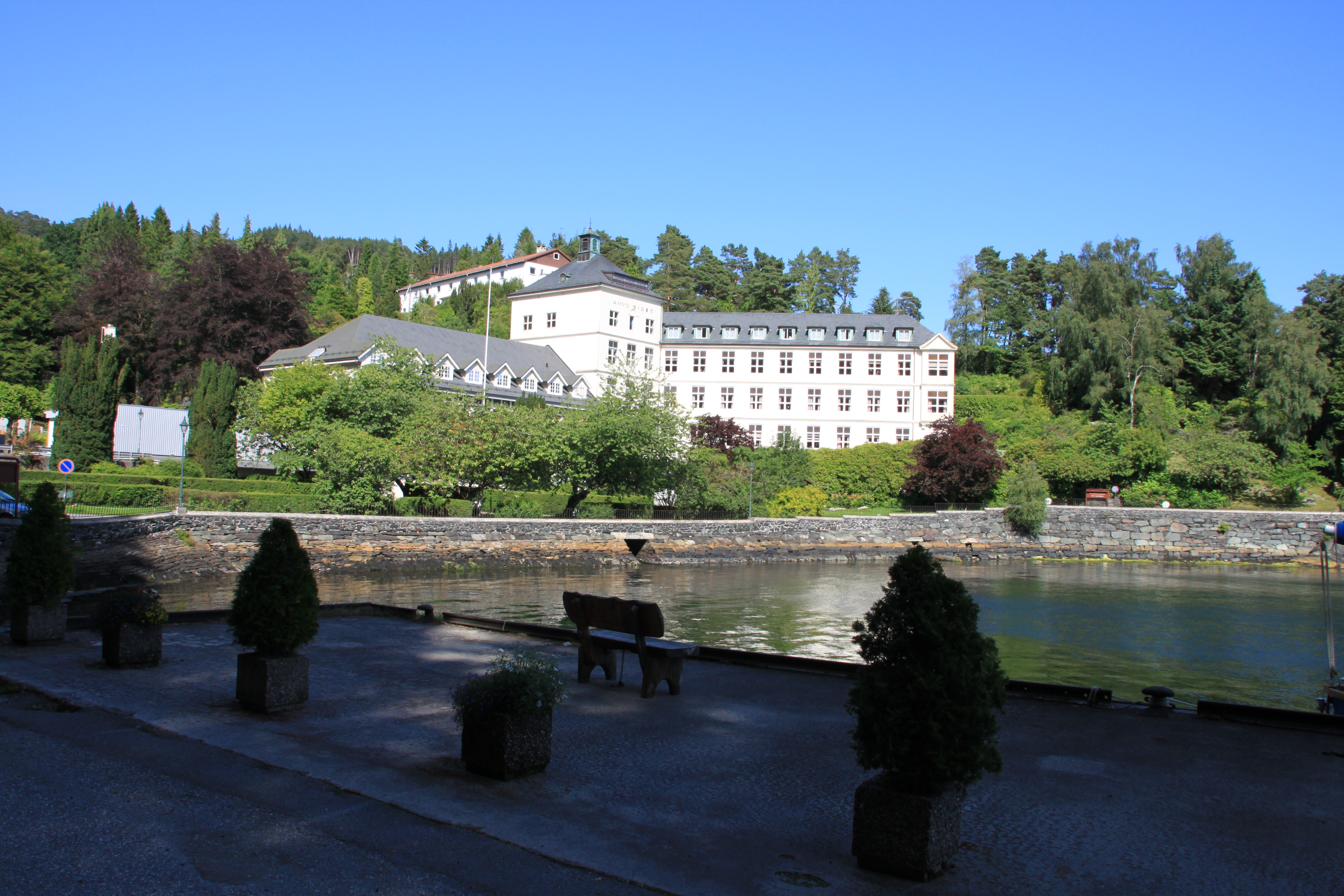 Bildet er tatt fra sjøsiden sommer 2013.